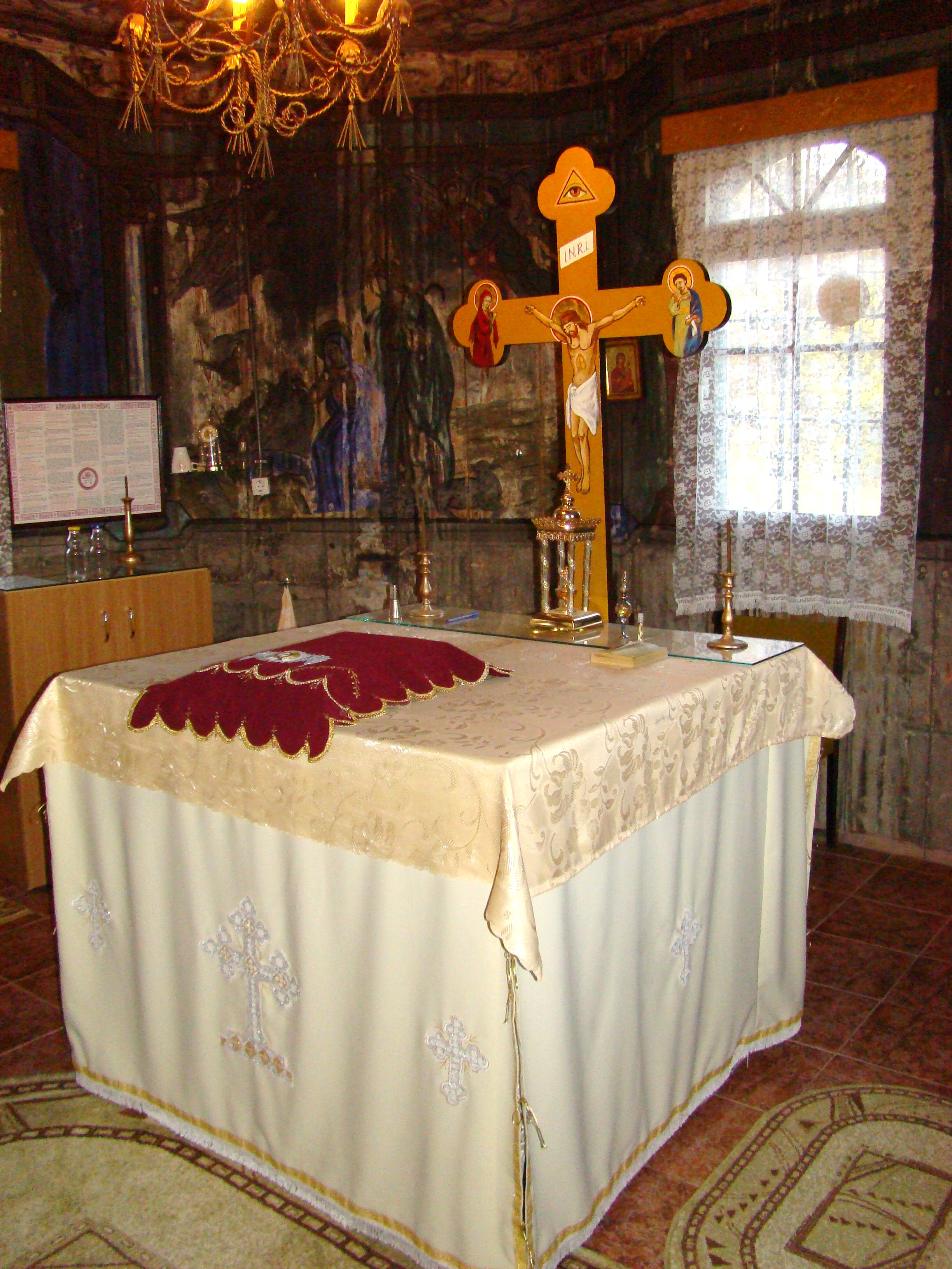 Biserica de lemn „Sf.Arhangheli” din Poarta, județul Mureș